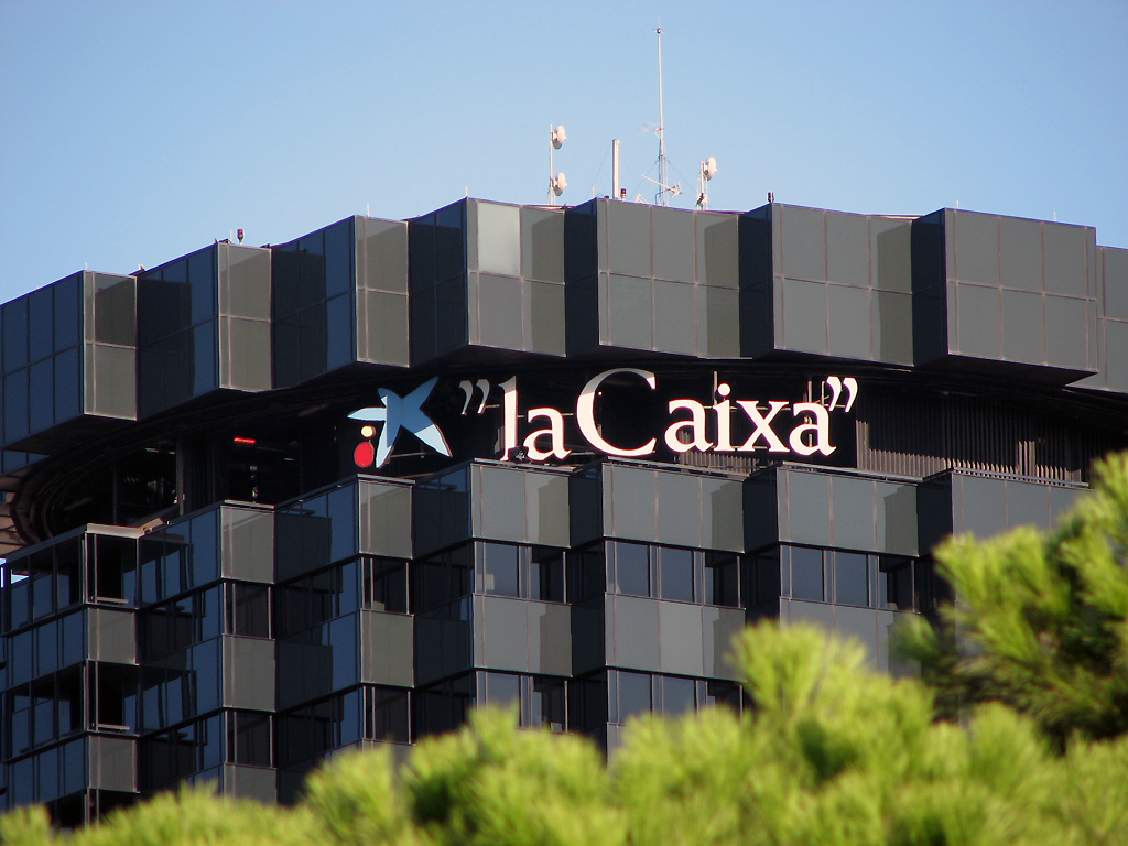 Sede de "La Caixa" en Barcelona, España.